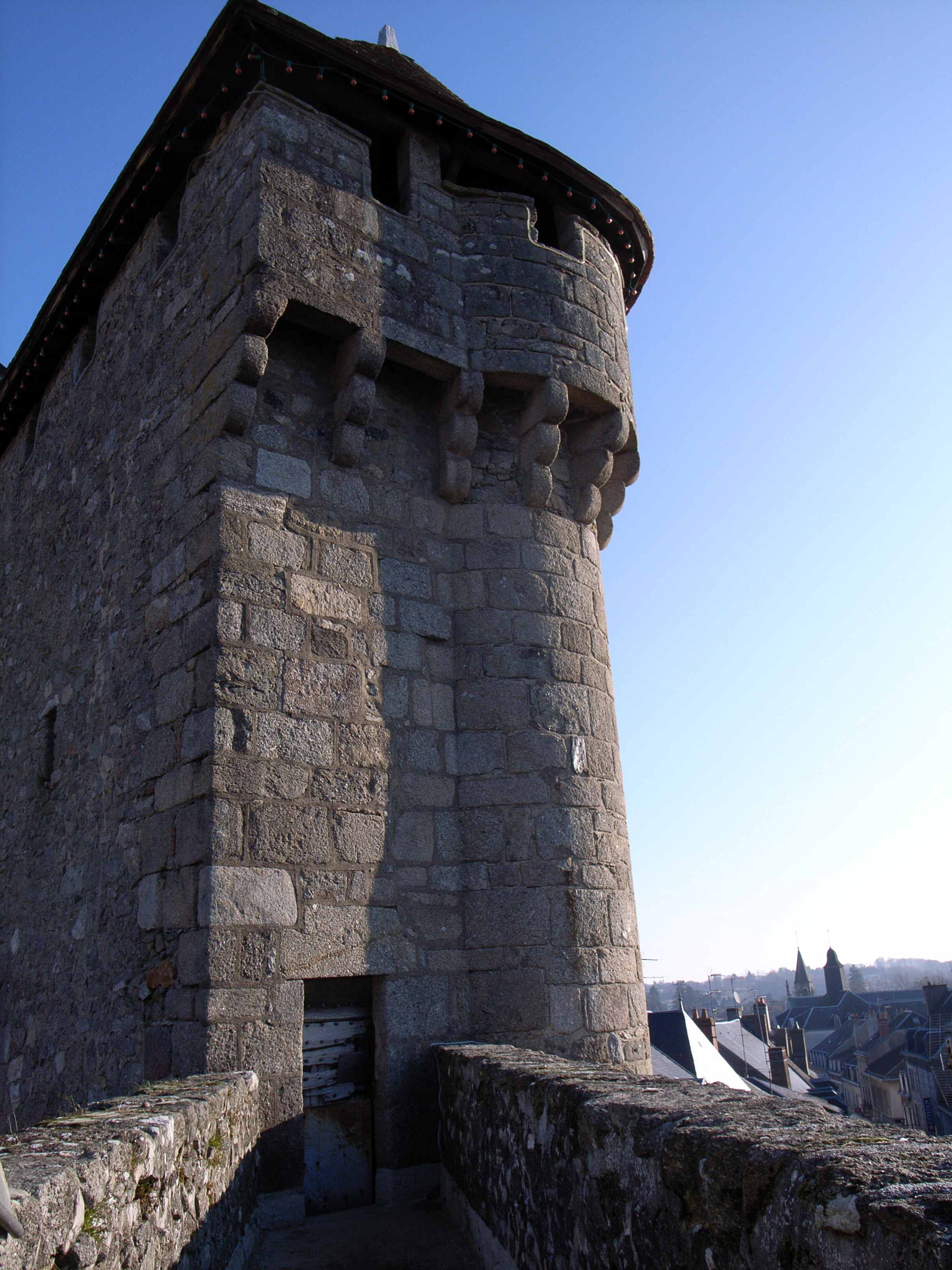 Tour de la Porte Saint Jean à La Souterraine, Creuse, France.